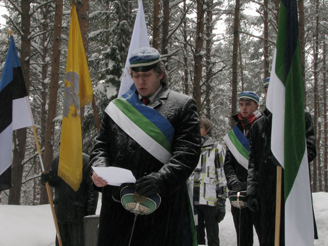 fr etica